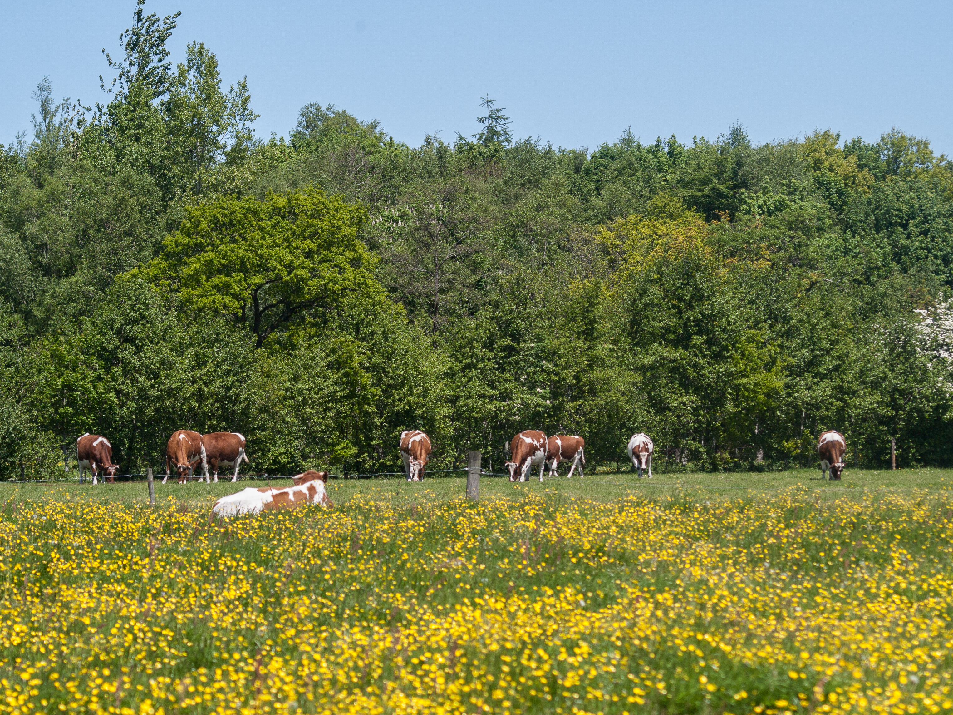 Roodbonte Friese koeien in de Friese Wouden